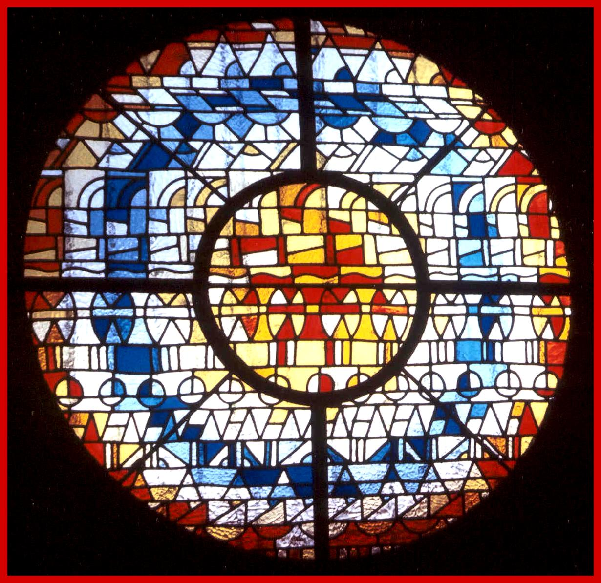 Lézignan-la-Cèbe (Hérault) - Église de l'Assomption-de-Notre-Dame - vitrail rond de Carlo Roccella.